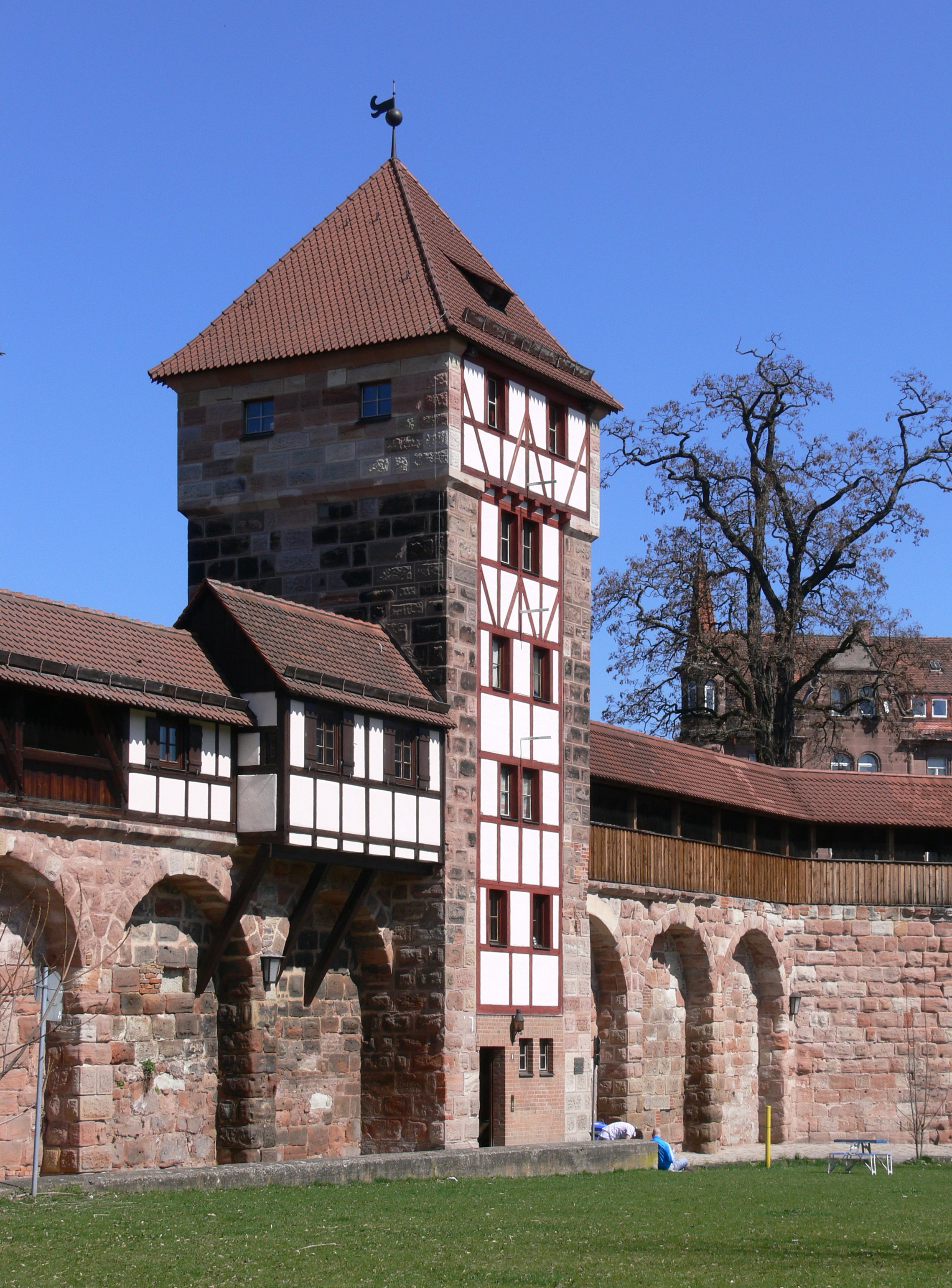 Nürnberg, Maxtormauer, Turm schwarzes H (Maxtormauer 9), Stadtseite